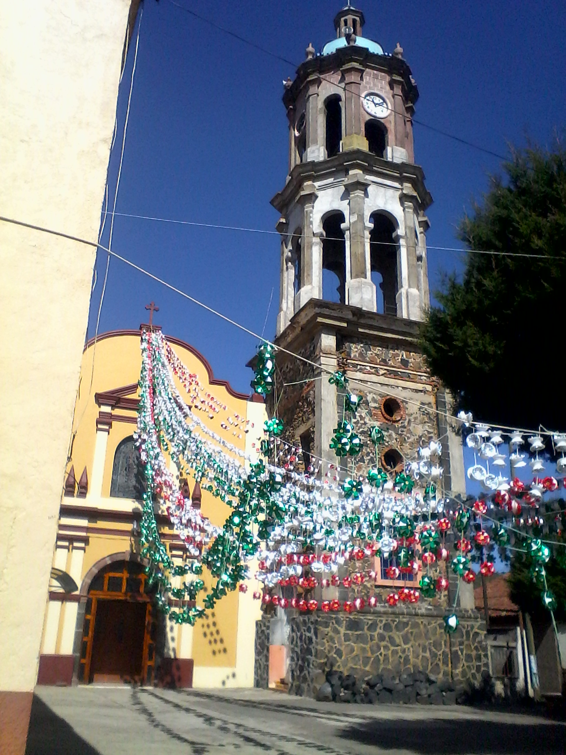 Capilla principal de la comunidad de Caurio de Guadalupe, municipio de Jiménez, Michoacán